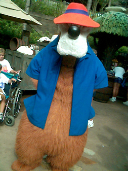 Bruin Beer.